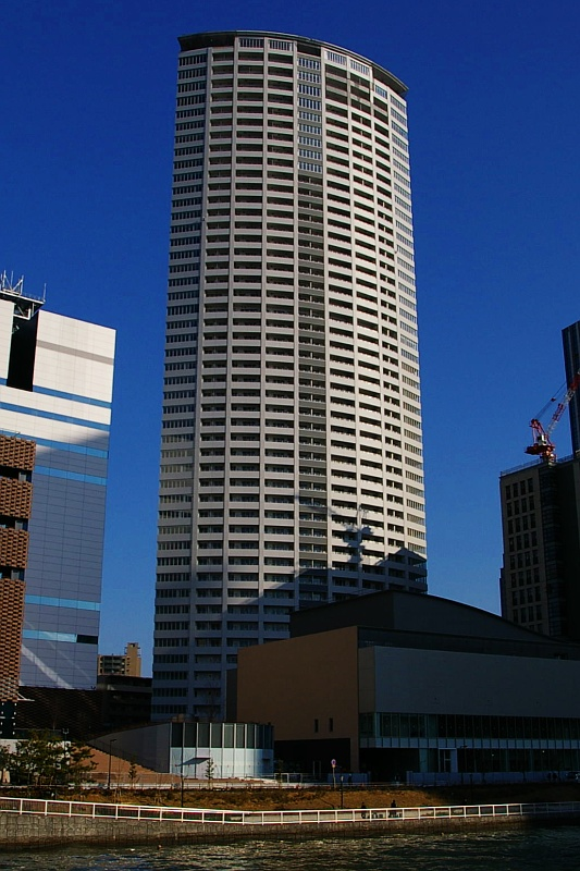 The Tower Osaka, Fukushimaku, Osaka City, Japan.